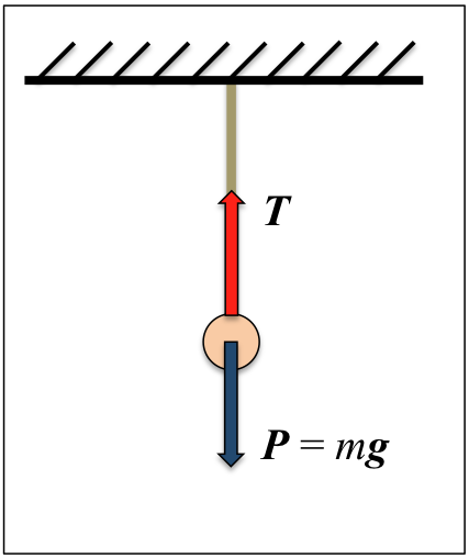 Sokatik eskegita masa orekan dago, norabide bera, aurkako noranzkoa eta modulu berbera duten bi indarren eraginpena baitaude.